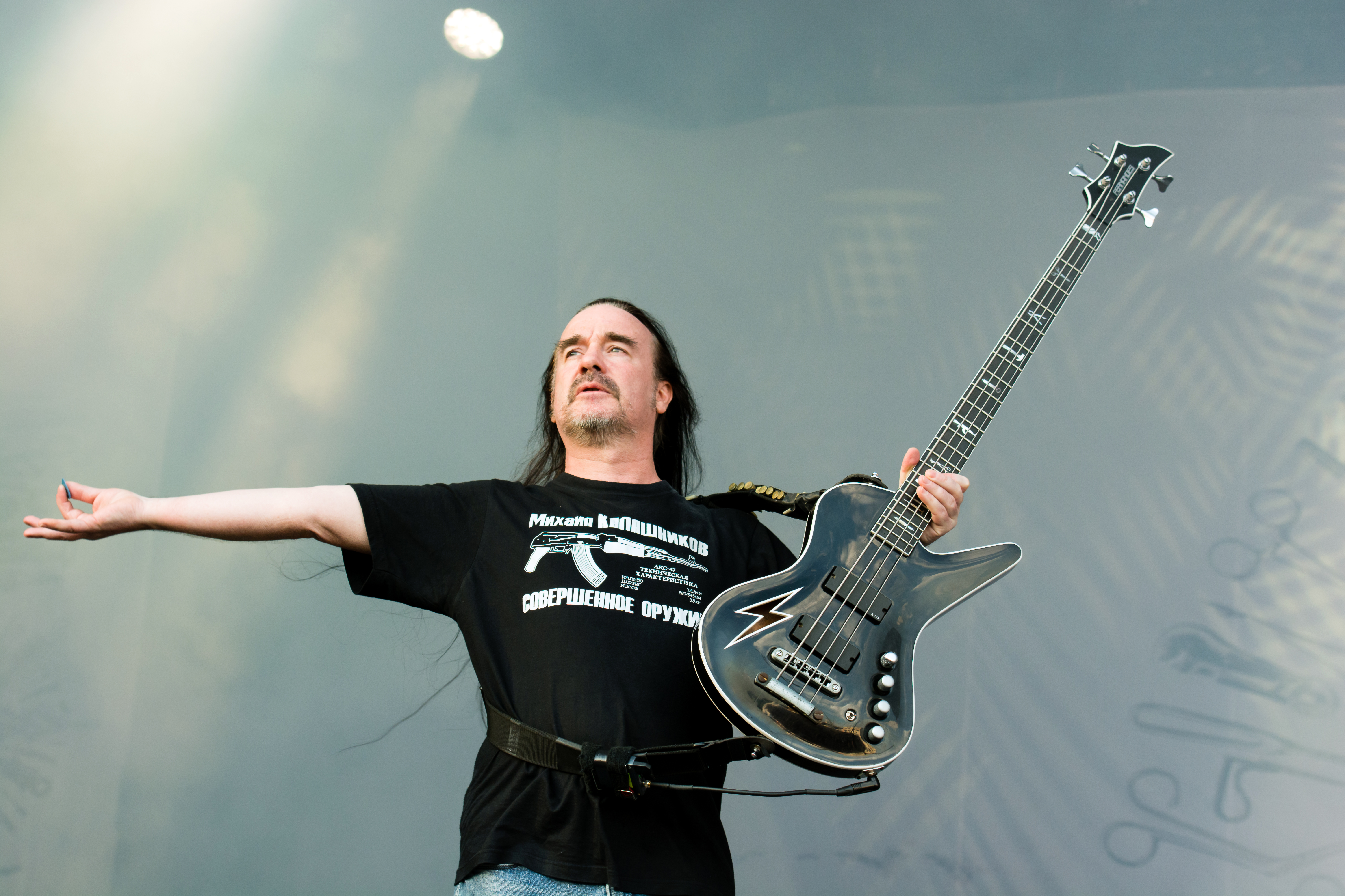 Carcass auf dem Elbriot 2016